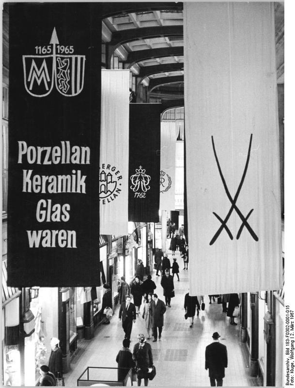 Leipzig, Mädler-Passage Zentralbild Kluge B 2.3.1967 Leipziger Frühjahrsmesse 1967 Messeatmosphäre in der Mädlerpassage.